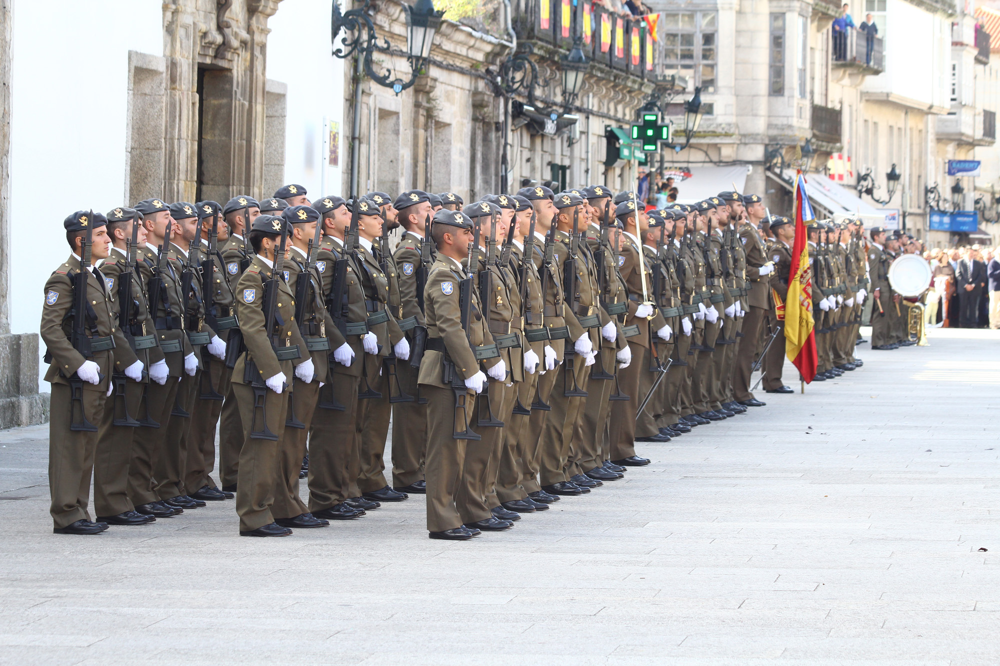 Tuy / Jura de Bandera para civiles Jura de Bandera para civiles celebrada en Tuy, Pontevedra (España), el 5 de octubre de 2014, con la presencia de efectivos del Regimiento de Infantería Ligera "Isabel la Católica" Nº 29, encuadrado en la Brigada de Infantería Ligera Aerotransportable "Galicia" VII (BRILAT), con sede en Figueirido, Pontevedra. Tuy / Pledge of Allegiance for civilians Pledge of Allegiance to civilians held in Tuy, Pontevedra (Spain), on October 5, 2014, with the presence of troops from Light Infantry Regiment "Isabel La Católica" No. 29, framed in the Airborne Light Infantry Brigade "Galicia" VII (BRILAT), located Figueirido, Pontevedra.